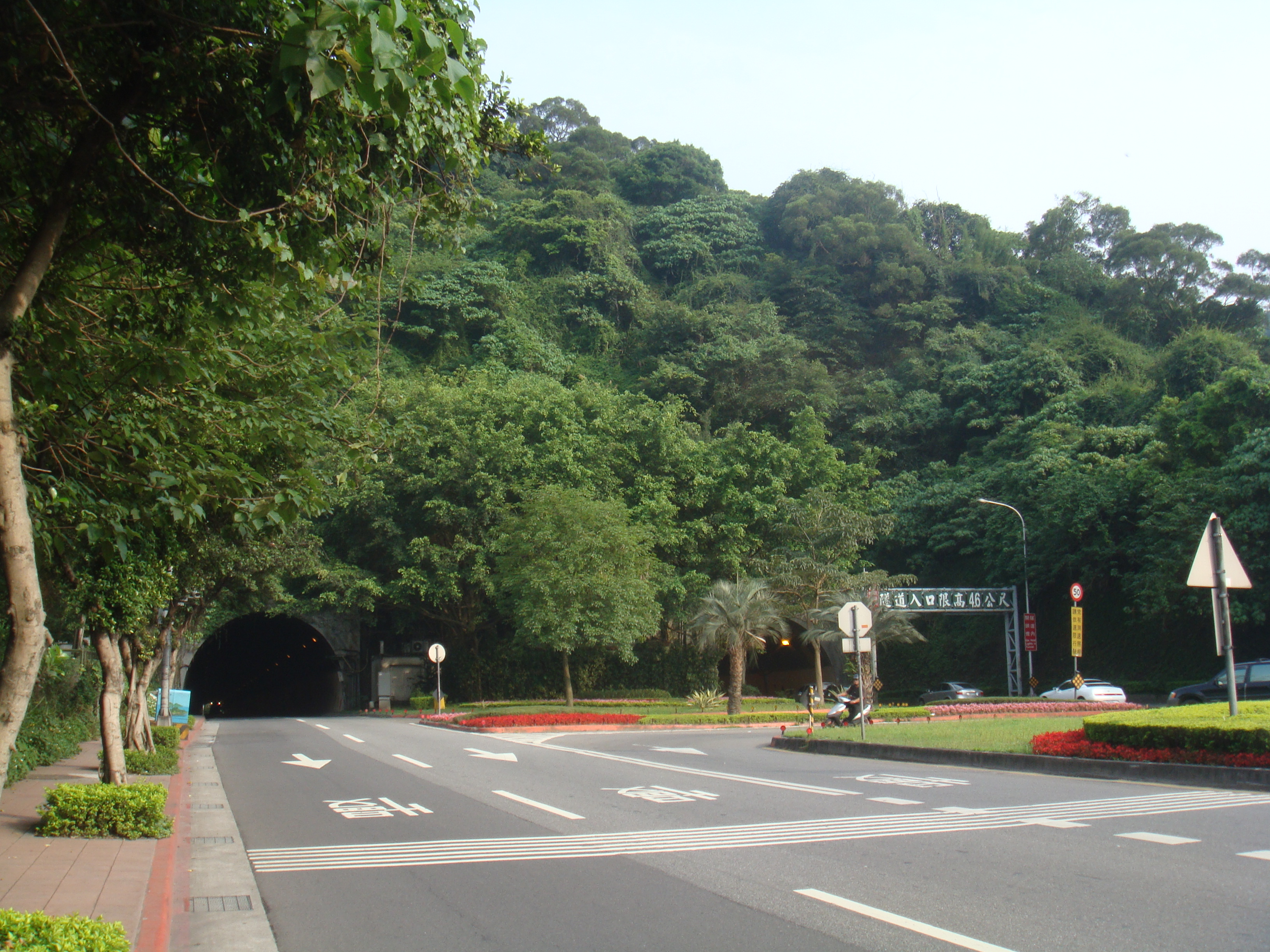 辛亥隧道西側（辛亥路三段、臺北市第二殯儀館側）入口。